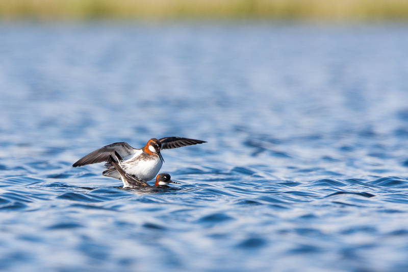 Cópula de phalaropus lobatus